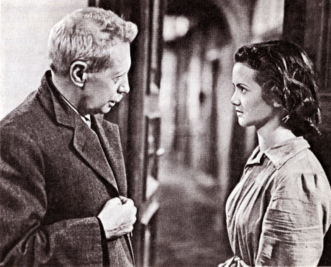 Carlo Battisti e Maria Pia Casilio in una foto di scena dal film Umberto D.